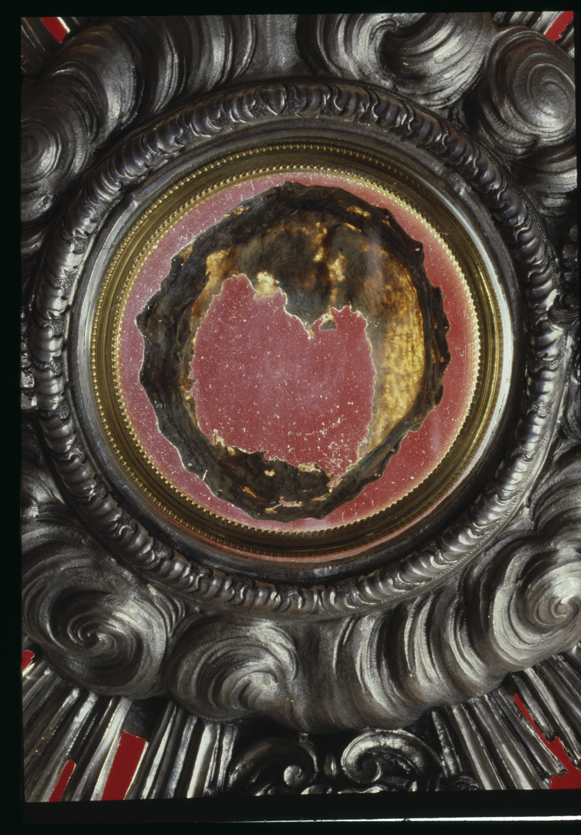 particolare dell'ostia trasformata in carne (Lanciano, Italia)